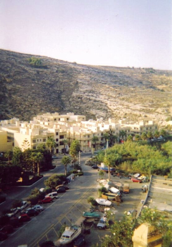 Xlendi (Gozo), Copyright @ Daniel Hausner Taken: August 2004